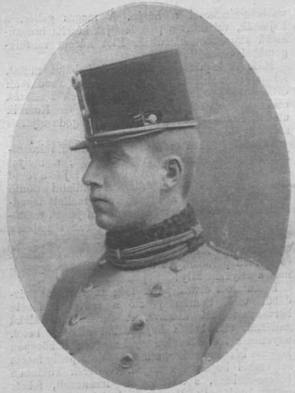 Illés Bourbon–pármai herceg (1880–1959)